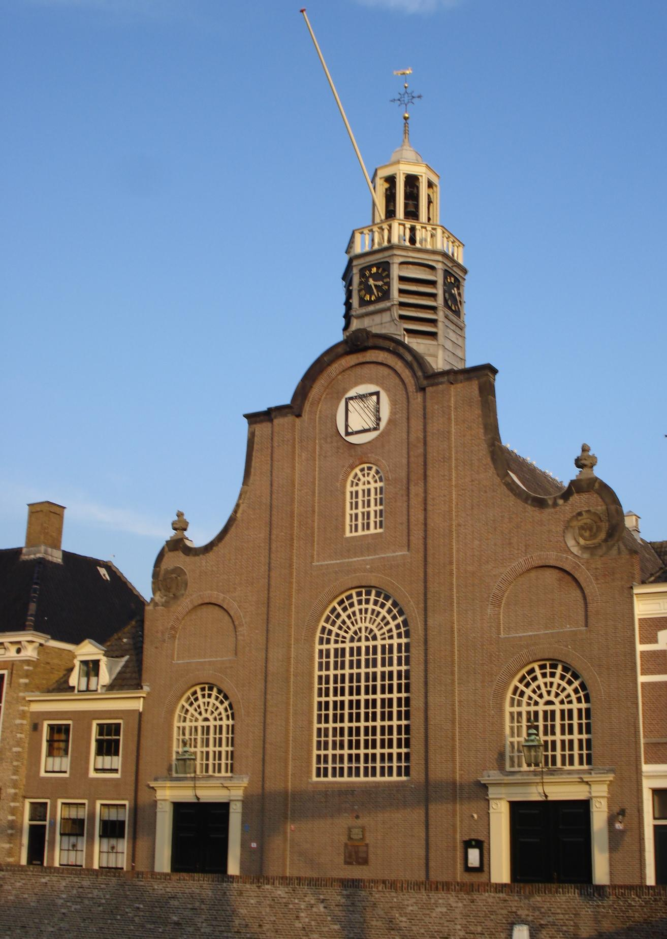 Rotterdam, delfshaven. Pelgrimskerk. Pilgrimschurch.